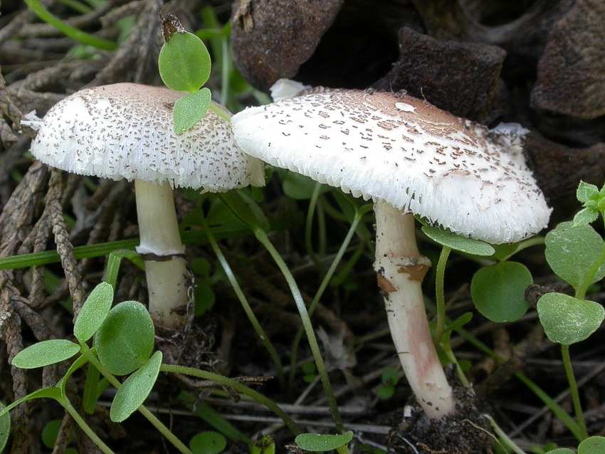 Lepiota lilacea. Foto di Vincenzo Migliozzi. Ritrovamento di Castel di Guido (Roma).